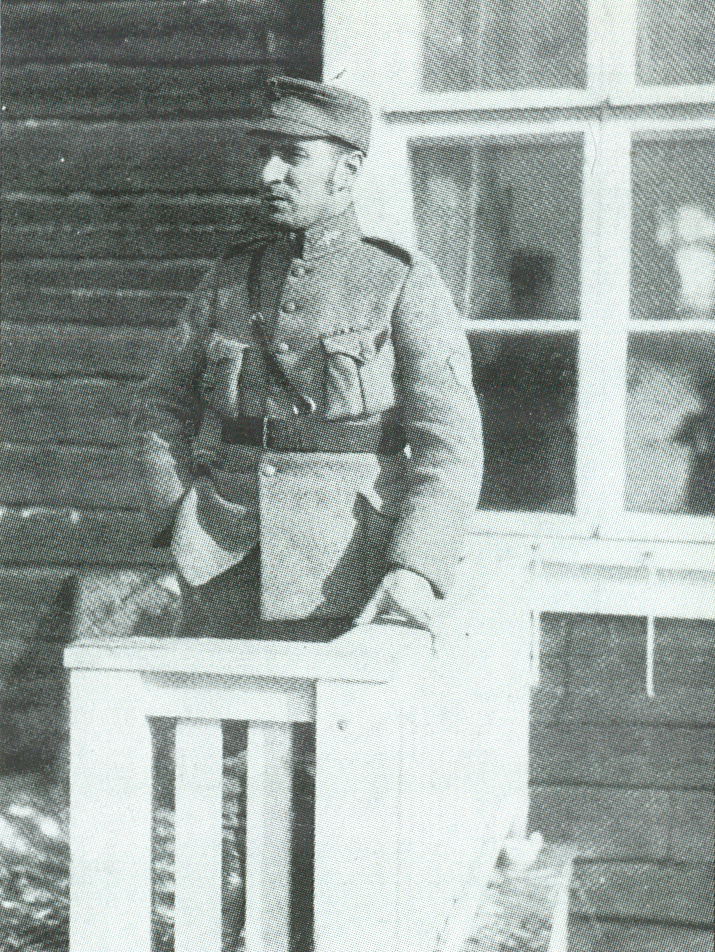 Artturi Vuorimaa.